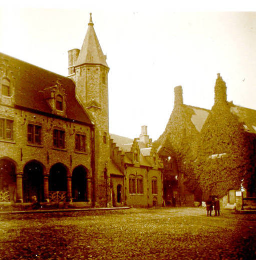 Edificis de la ciutat. Marcel·lí Gausachs i Gausachs (Entre 1920 i 1930)